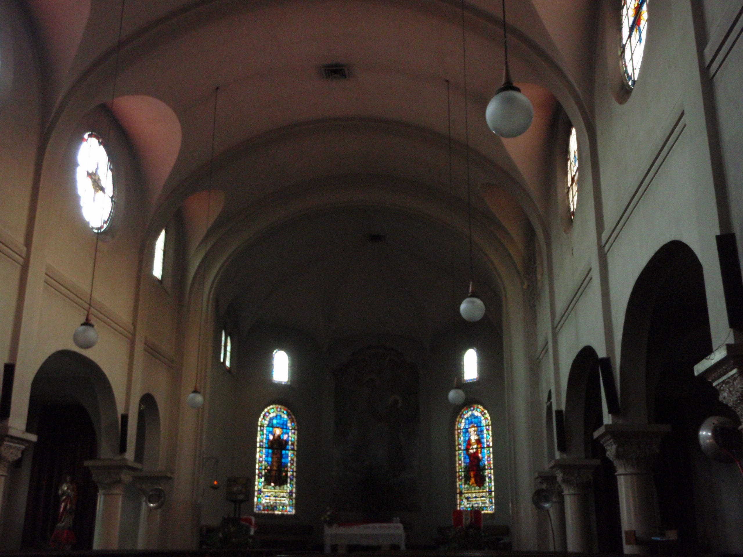 Iglesia San Francisco de Valdivia This is a photo of a national monument in Chile: 2005